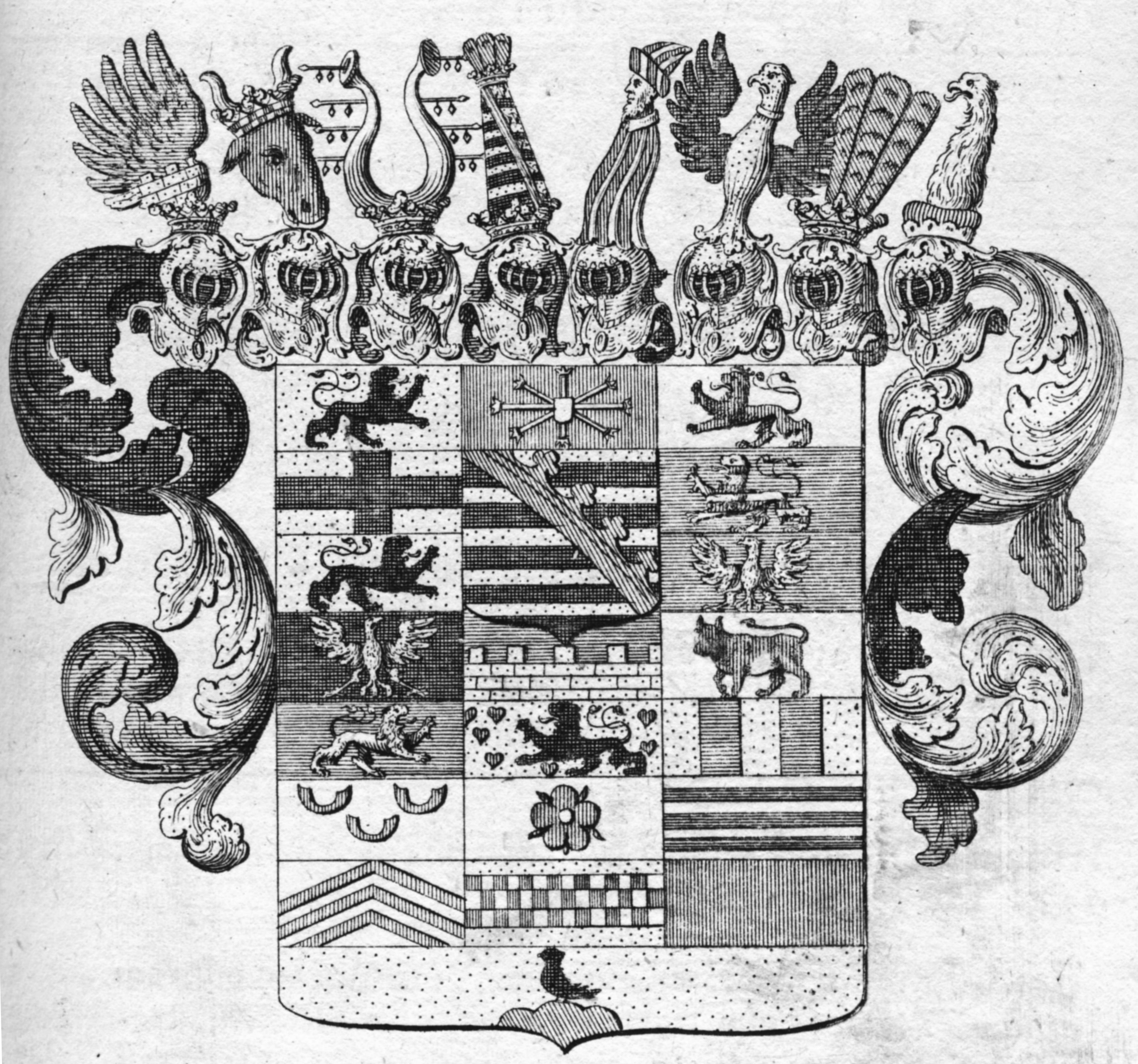 Wappen des Herzogtums Sachsen-Merseburg